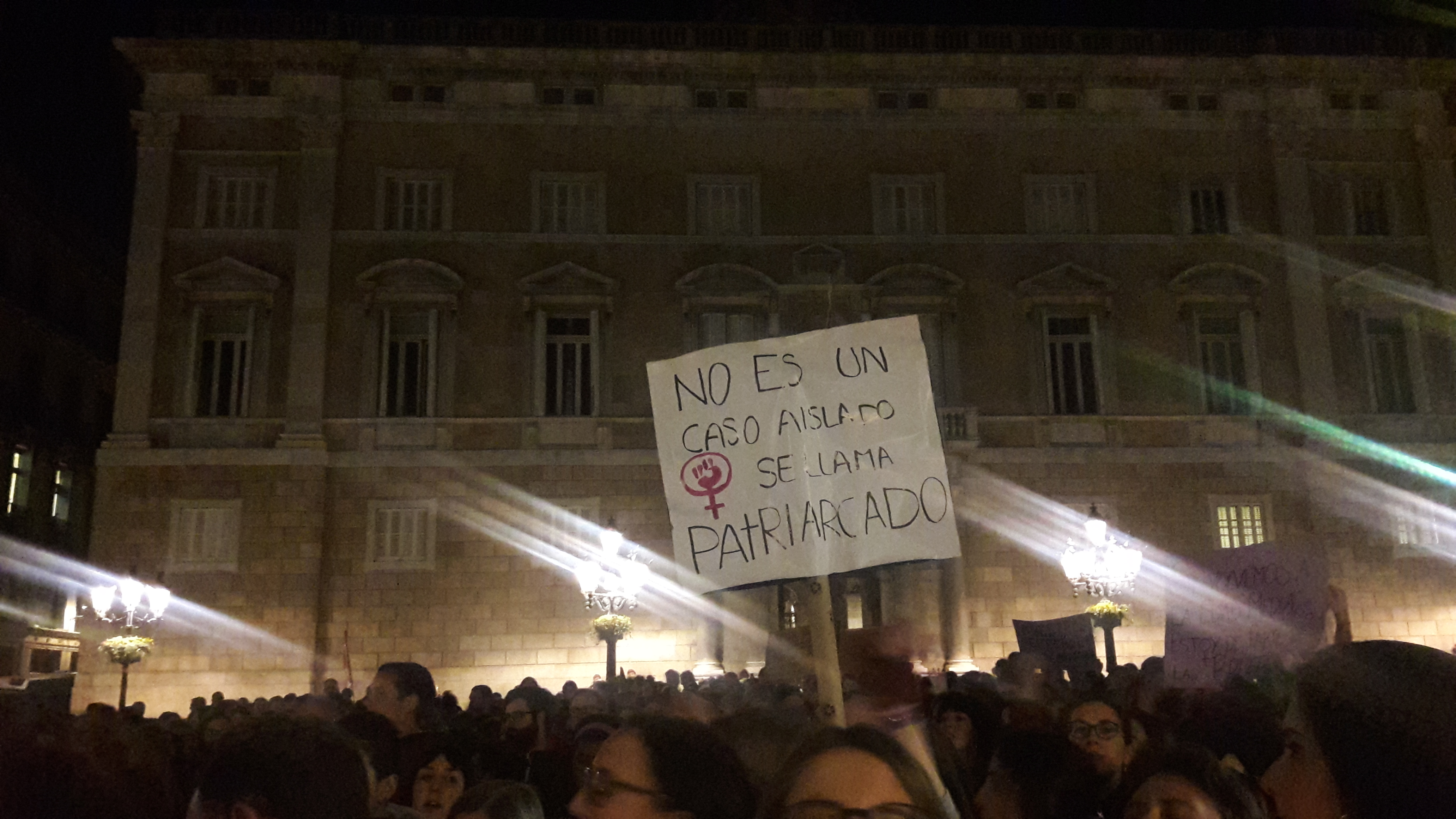 Manifestación por los derechos de las mujeres en la Plaça Sant Jaume de Barcelona (enero 2019)